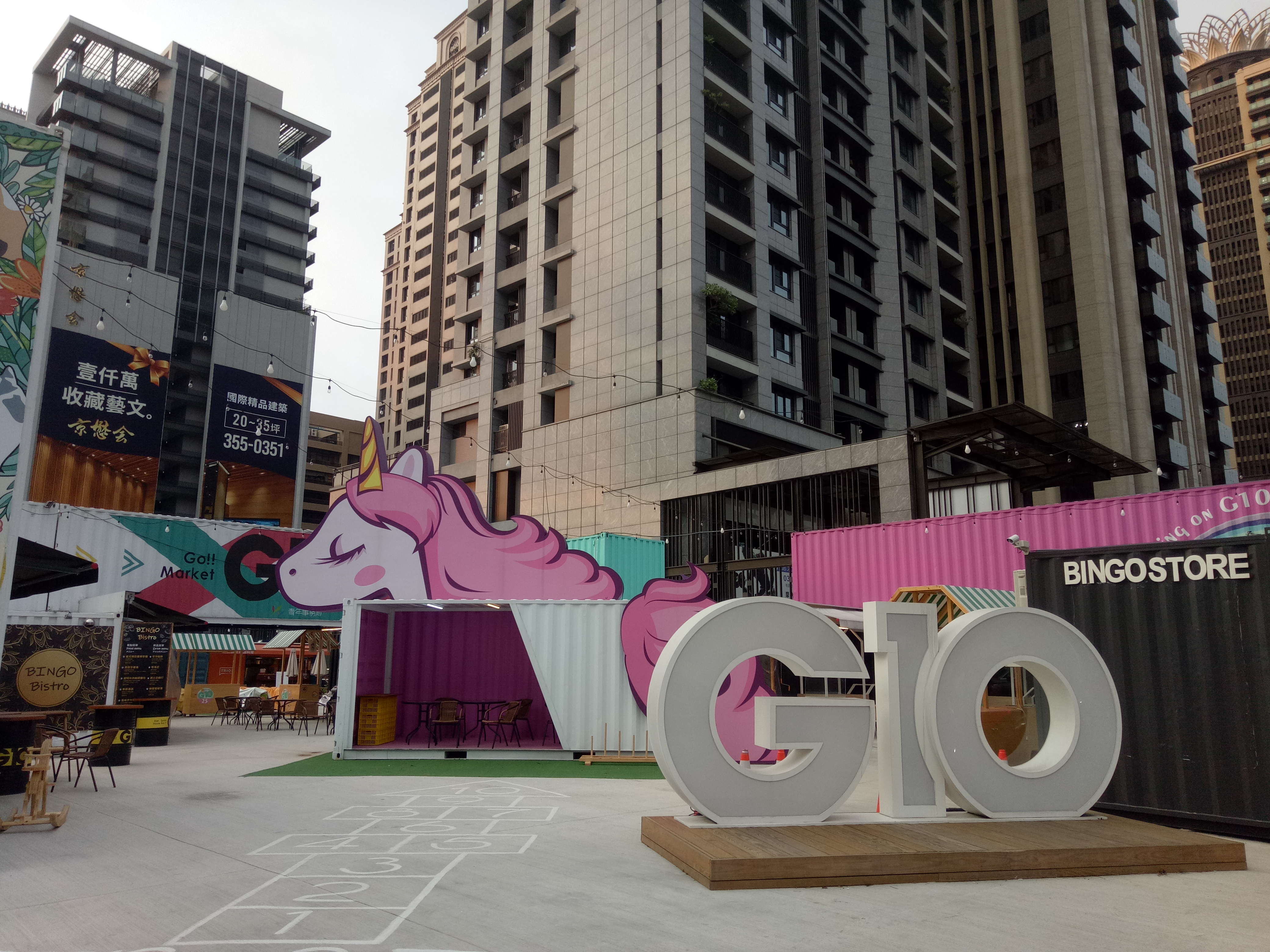 桃園市G10 Go!貨櫃市集一景。